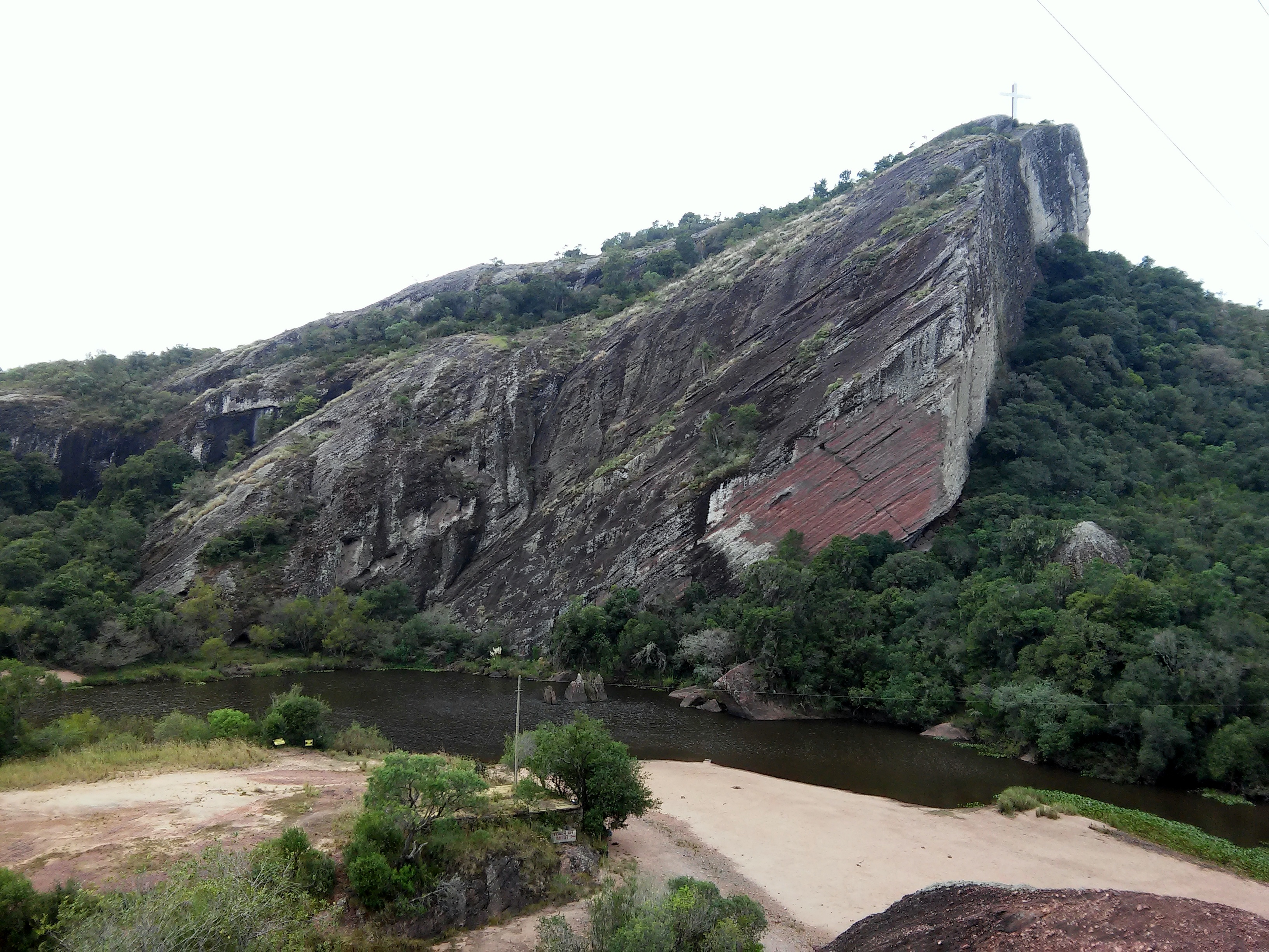 Vista Parcial da Pedra da Cruz, no distrito de Minas do Camaquã.